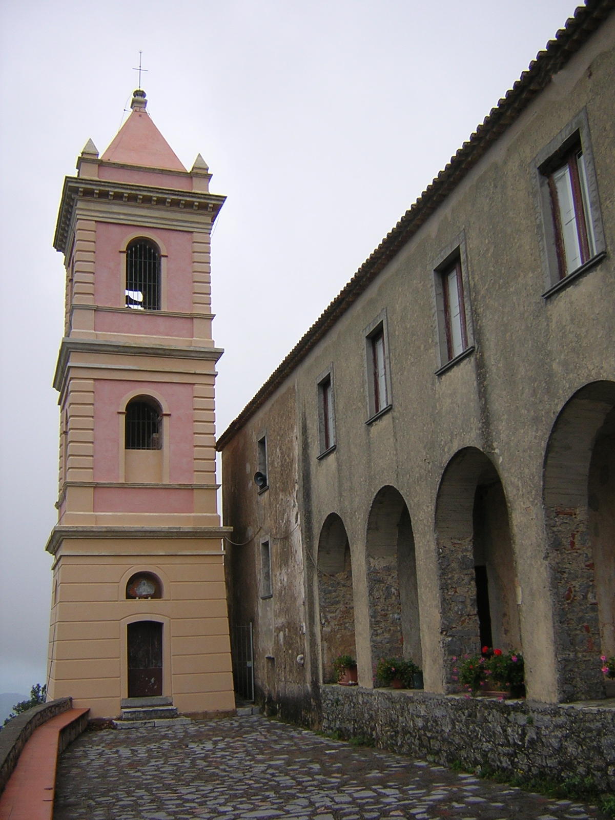 San Giovanni a Piro: il campanile del Santuario_di_Pietrasanta.